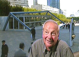 Portrait de François Morellet. Derrière lui, on peut apercevoir l'une de ses intégrations architecturales, réalisée à La Défense, à Paris.